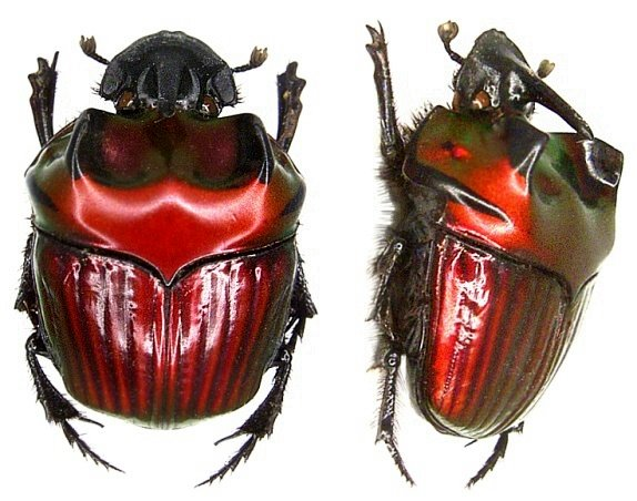 Familie: Scarabaeidae Grösse: 18-25 mm Verbreitung: Brasilien, Franz. Guana, Surinam, Guyana Fundort: Brasilien, Para Santarem leg. 1985; det. U.Schmidt Foto: U.Schmidt, 2006